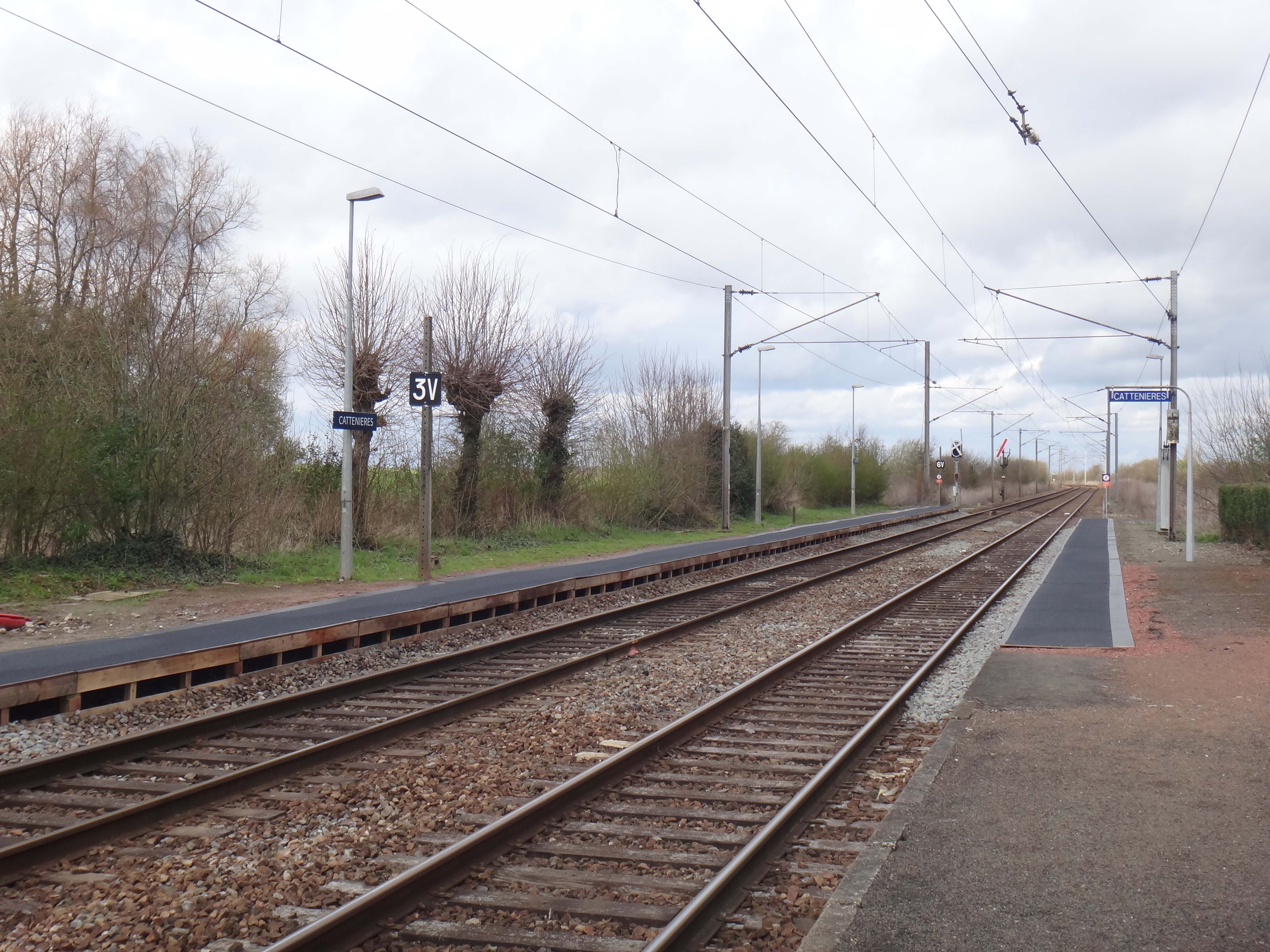 Gare de Cattenières, Nord, France, en 2014